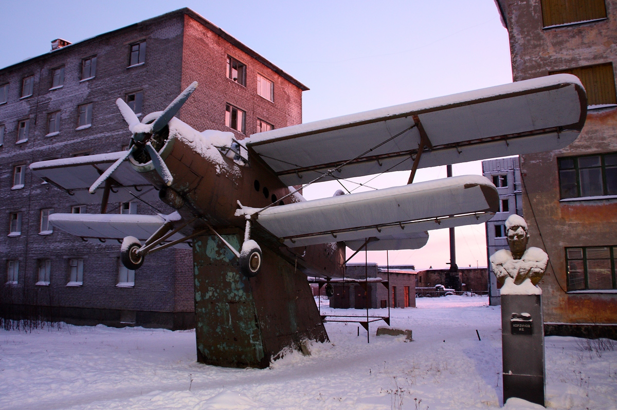 Antonov An-2 at Korzunovo